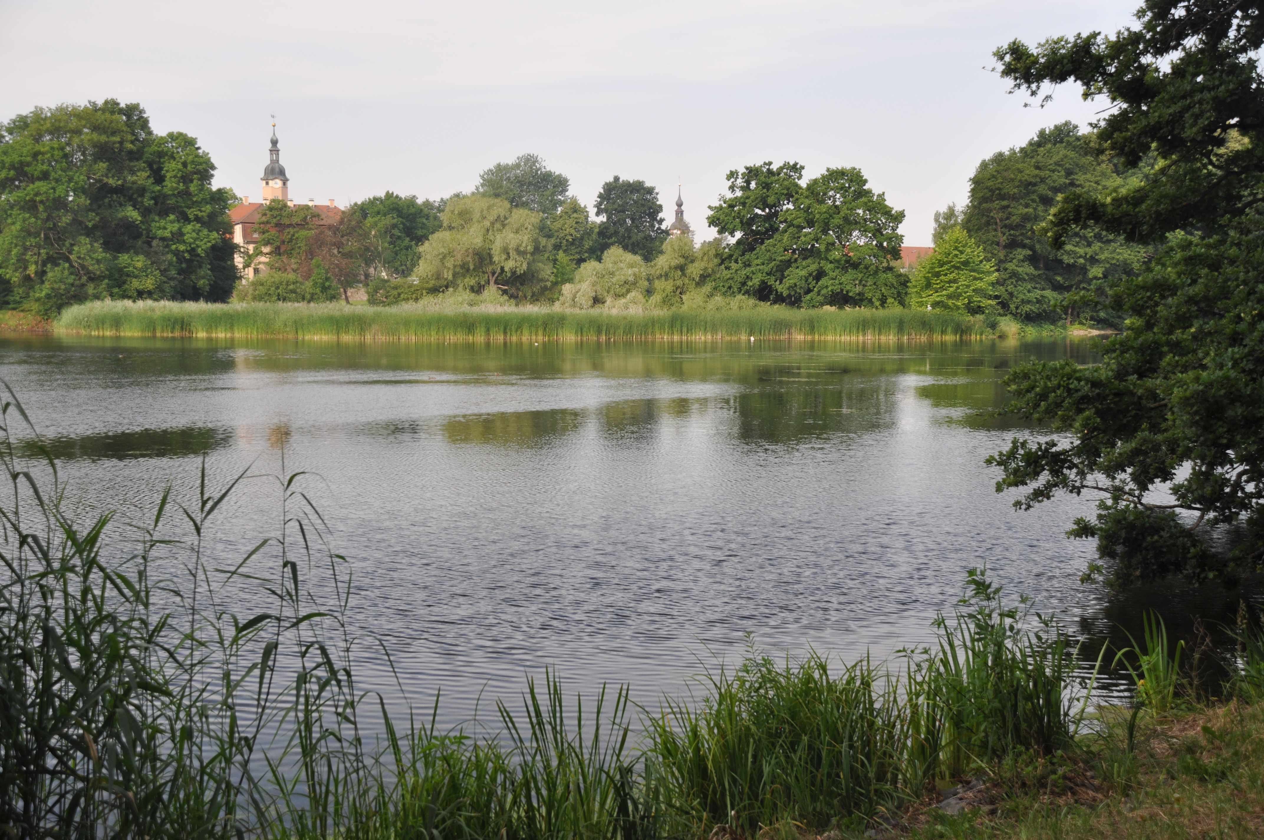 Machern, Schlosspark